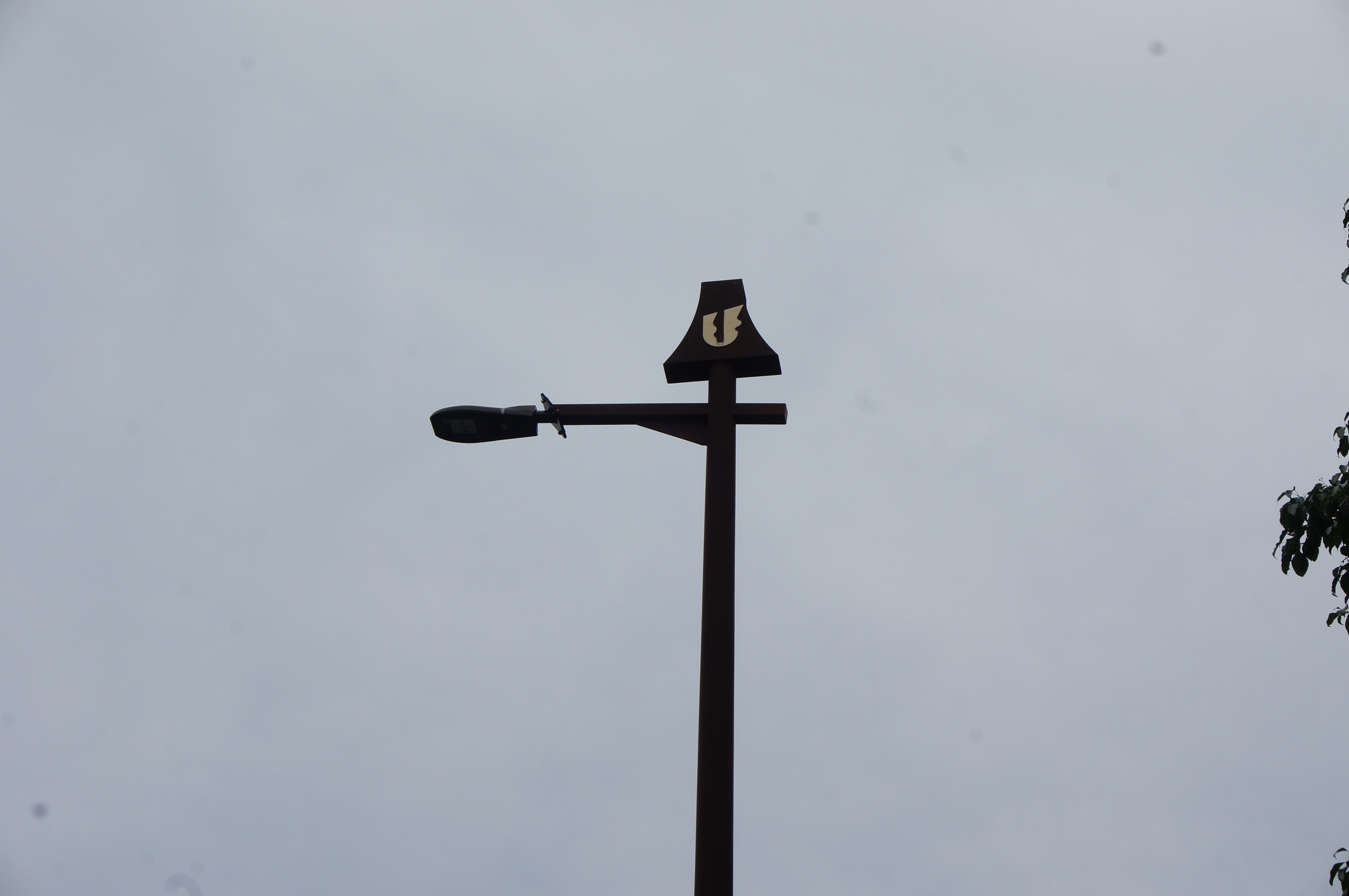 ユニバーシアード福岡大会のシンボルマークが描かれた街灯。現在もウェーブコースト前に残っている。